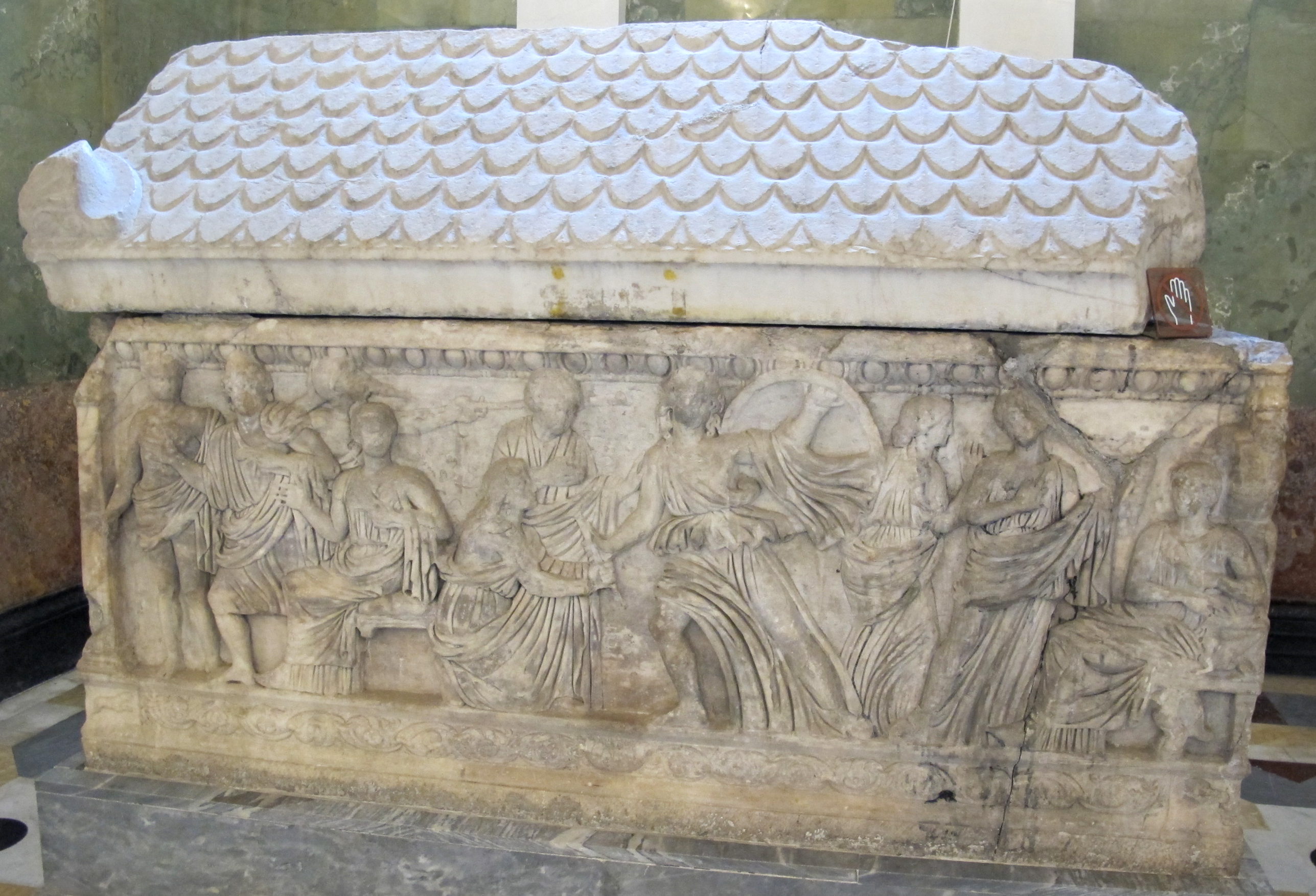 Sarcofago con coperchio III sec